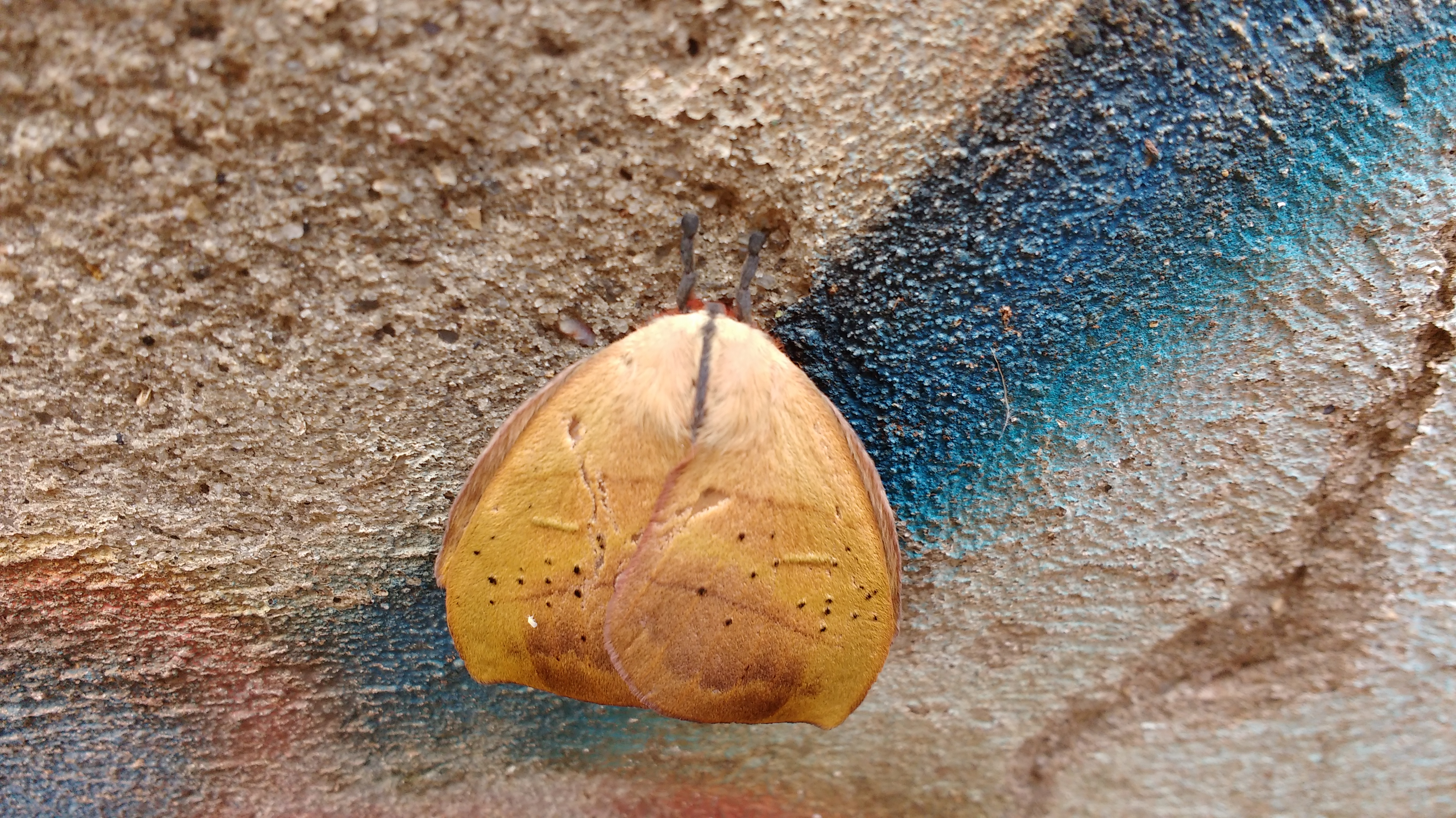 Exemplar da mariposa Hyperchiria incisa, em Caetité, estado da Bahia, Brasil.